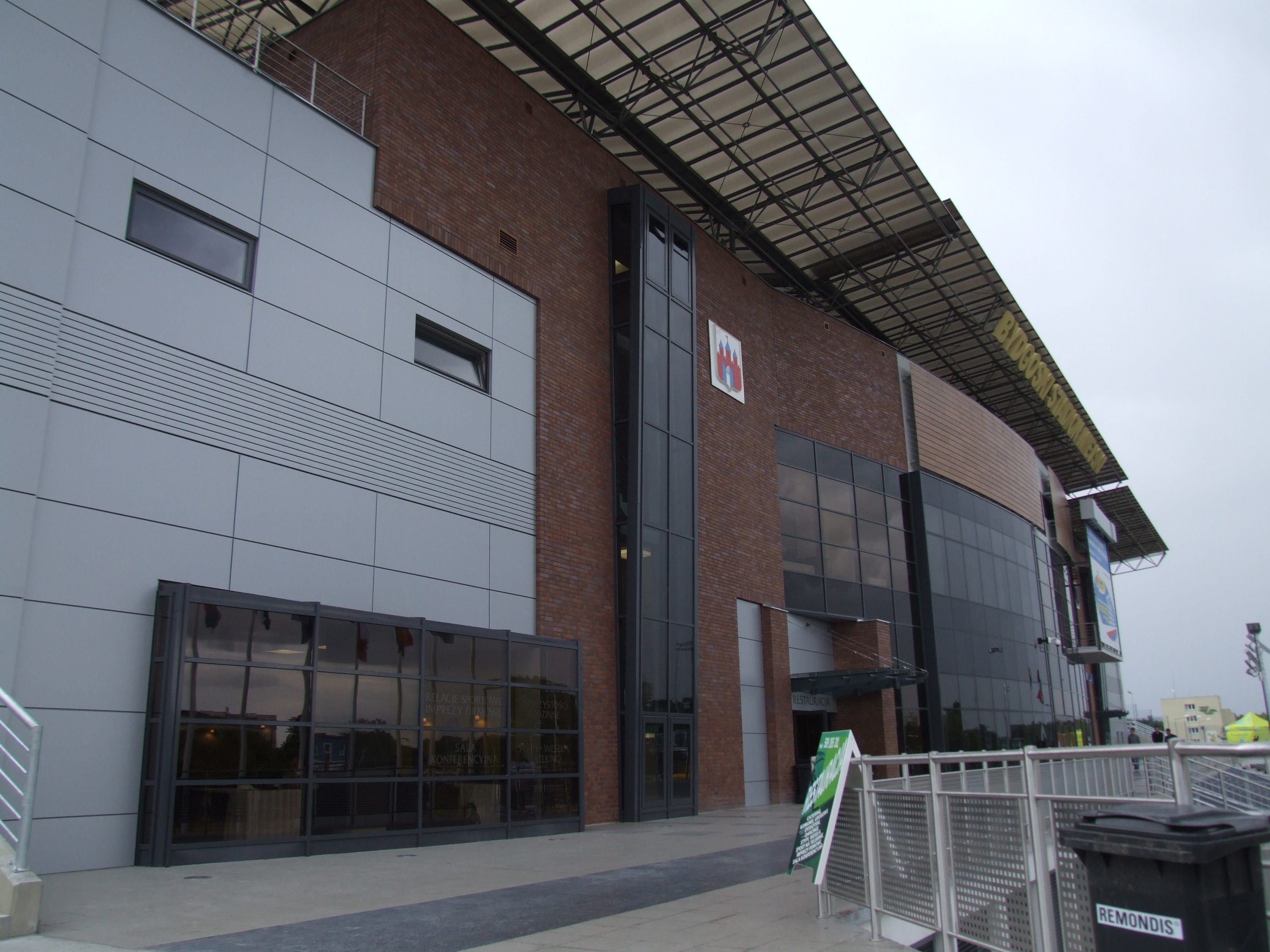 Stadion Zawiszy: 12. Mistrzostwa Świata Juniorów w Lekkeij Atletyce, Bydgoszcz, 8-13.07.2008